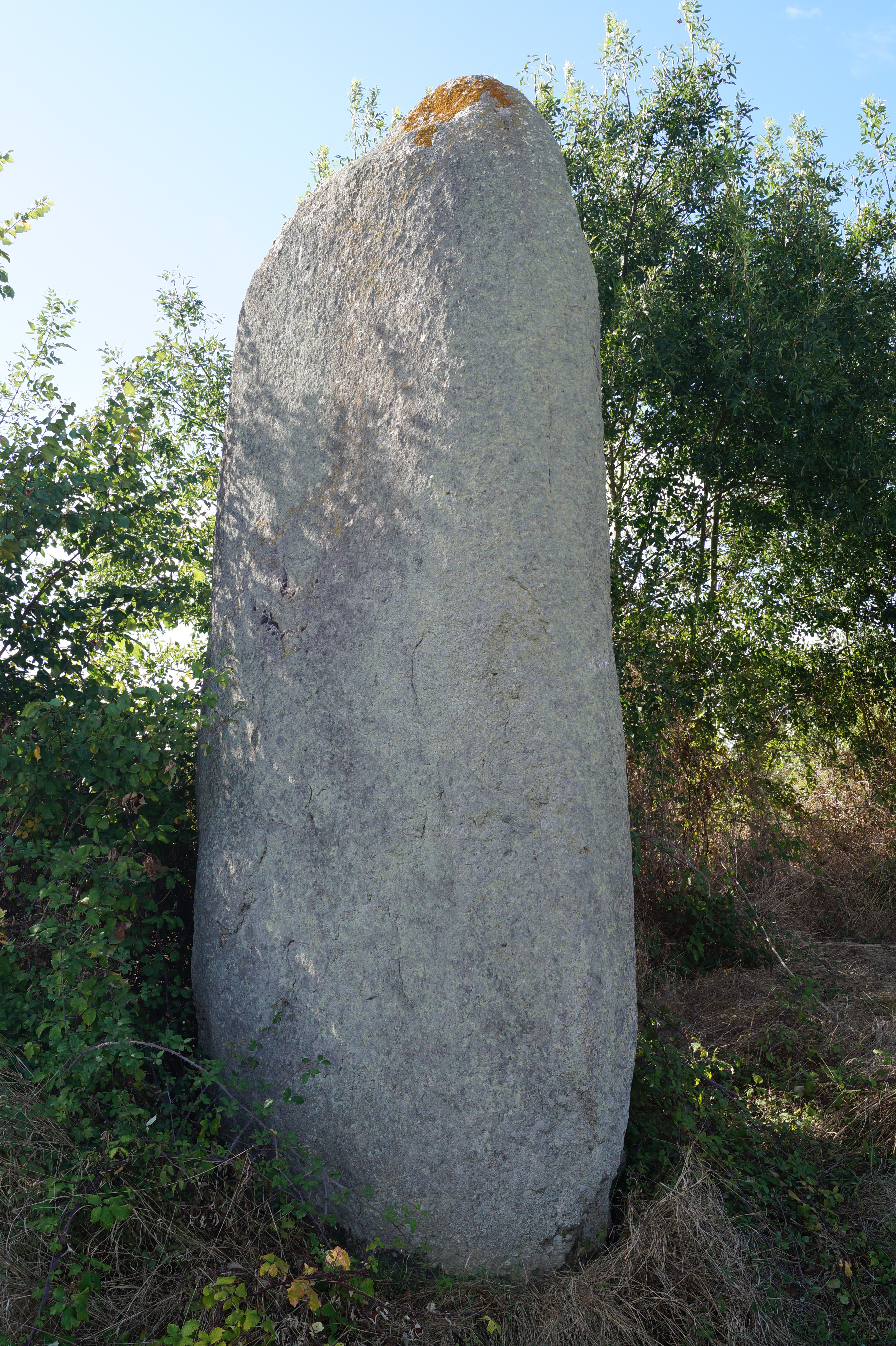 Le menhir de la Chenillée.